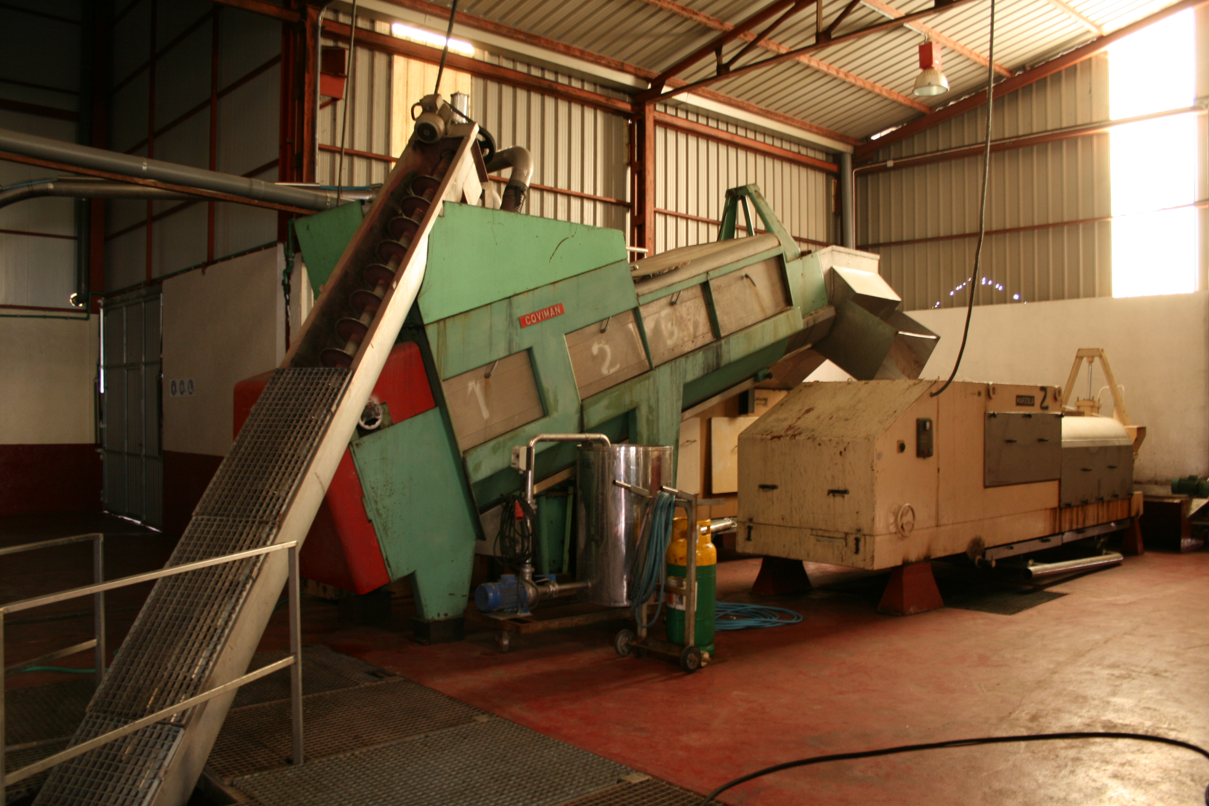 Kontinuierliche Schneckenpresse mit vorgeschalteter Vorentsaftung